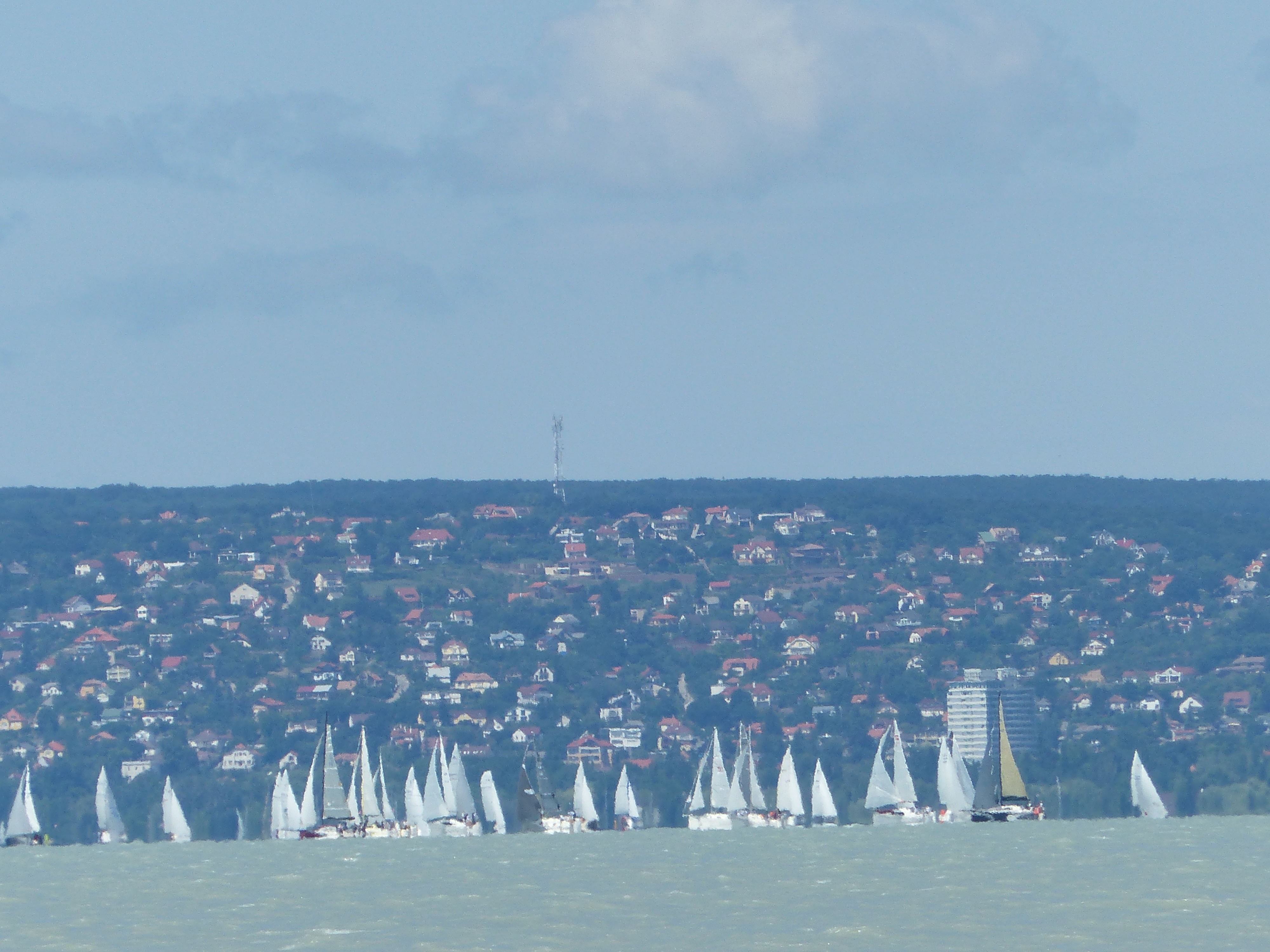 A felvétel 2017. július 1-én készült Balatonakarattyáról, a Lidó strandról. 20. Fehér Szalag, Izsák Szabolcs Emlékverseny Balatonalmádinál.